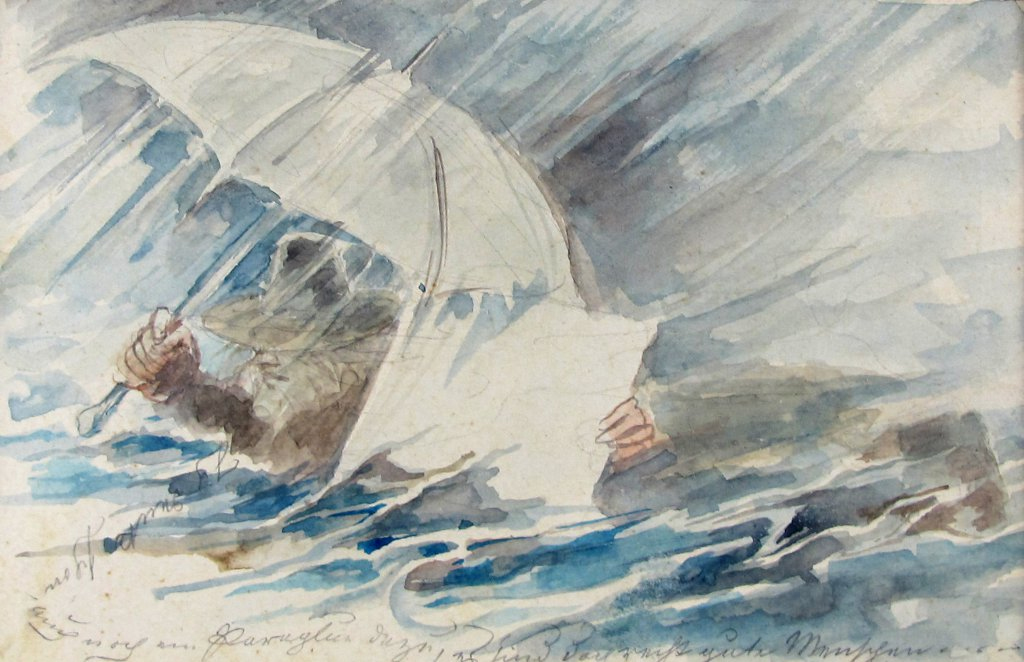 Aquarell 02